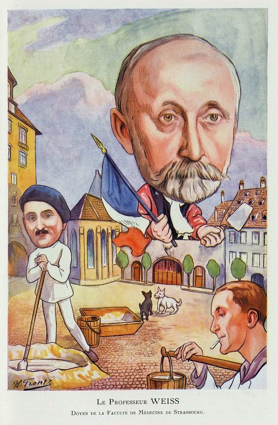 Caricature de Georges Weiss et de ses deux fils Chanteclair . - 1922. - 17e année Romainville : Carnine Lefrancq, 1906-1936.